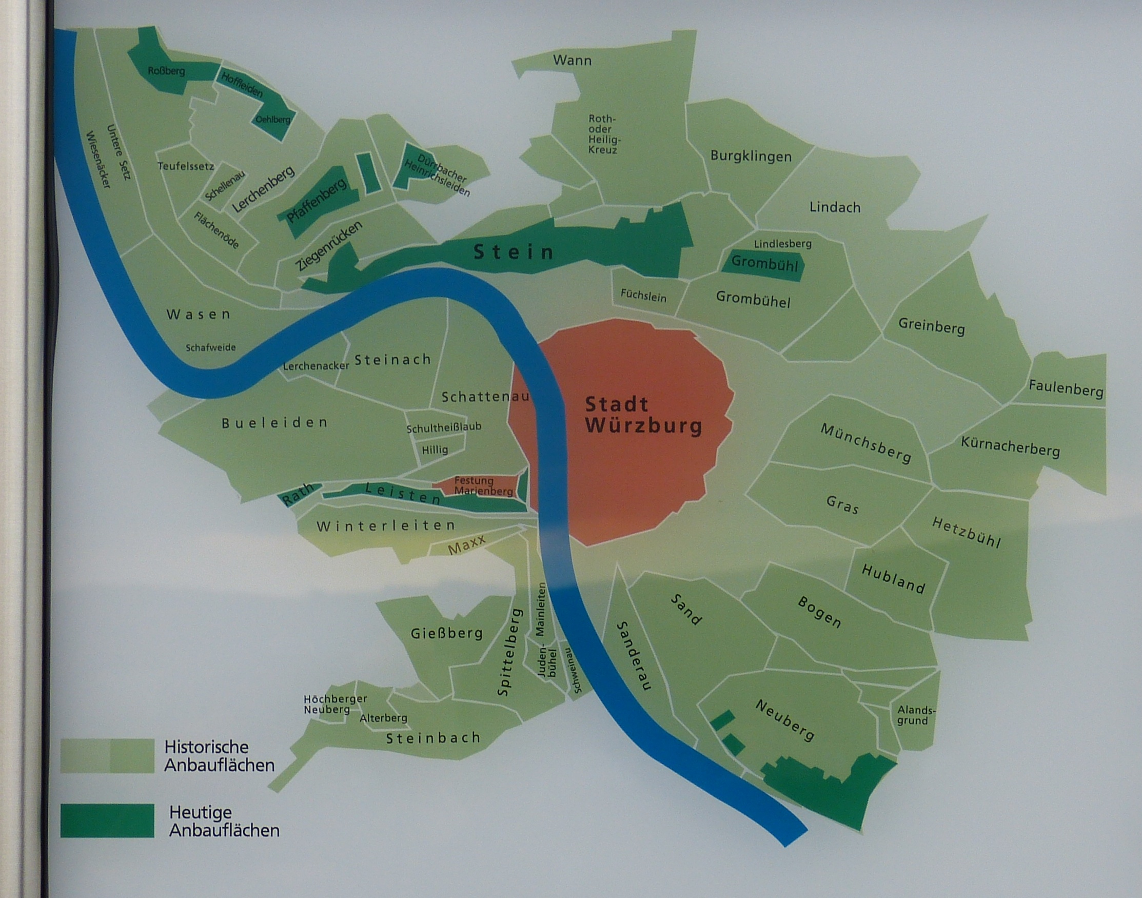 Weinbau um Würzburg, von einer Infotafel am Würzburger Stein